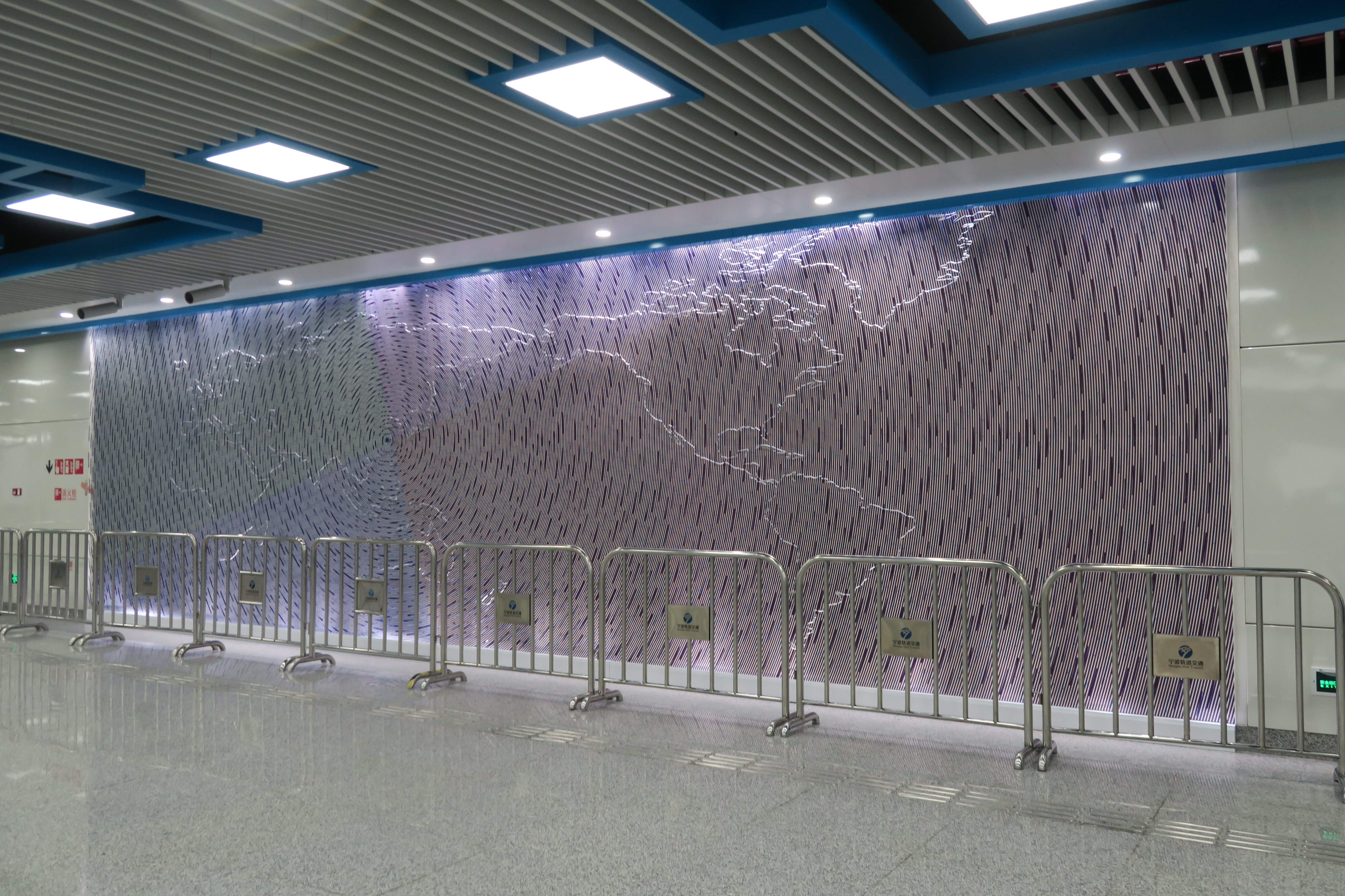 宁波轨道交通栎社国际机场站艺术墙“空港筑梦”